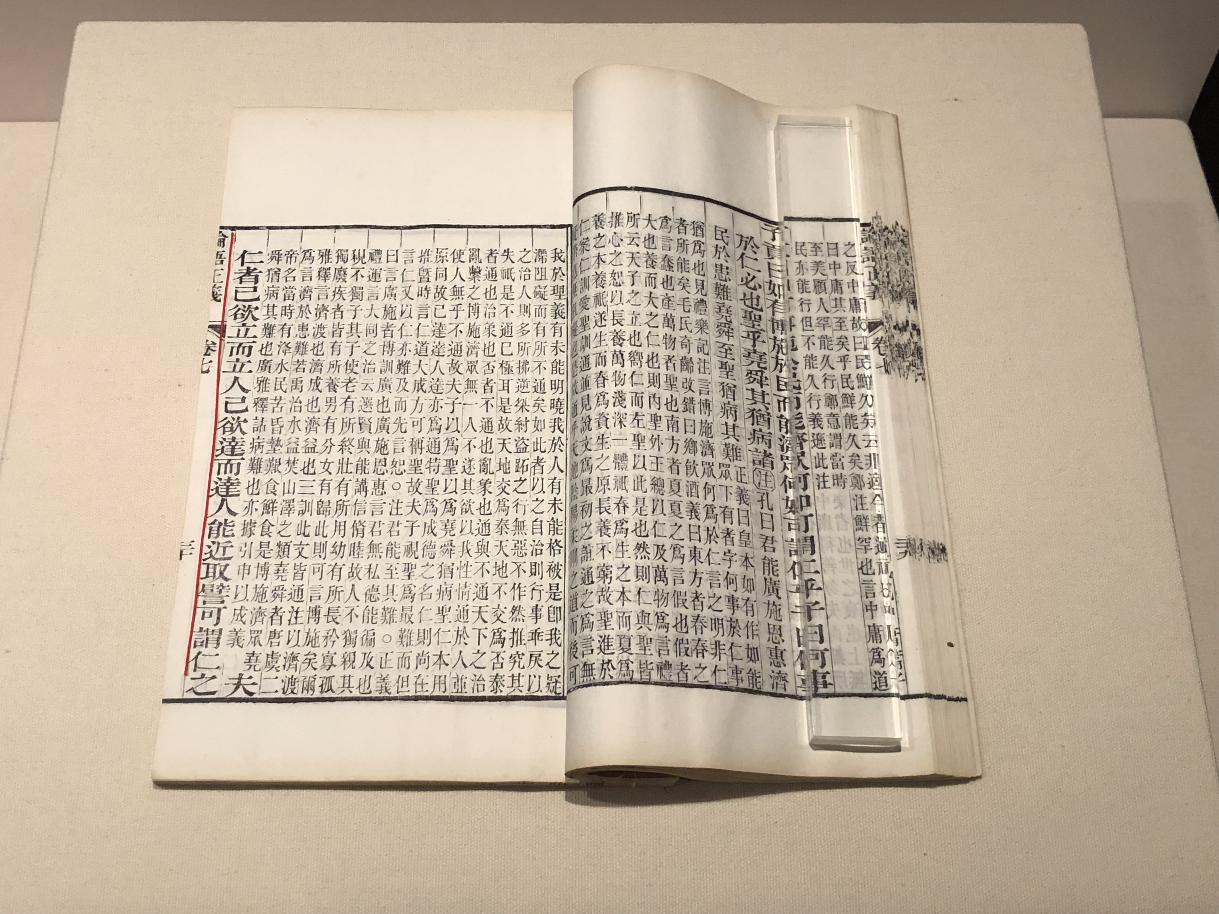 论语正义二十四卷 清同治五年（1866）刻重印本 清：刘宝楠撰。国家图书馆藏。